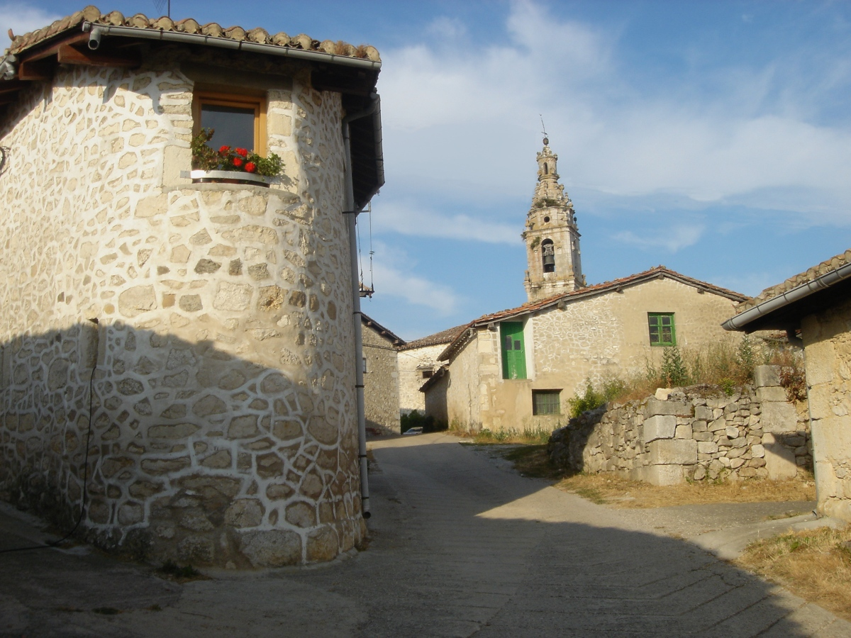 Arrietako herria (Trebiñu, Burgos, Espainia)